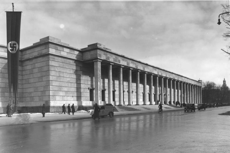 Schönes Deutschland Das Haus der Deutschen Kunst in München.